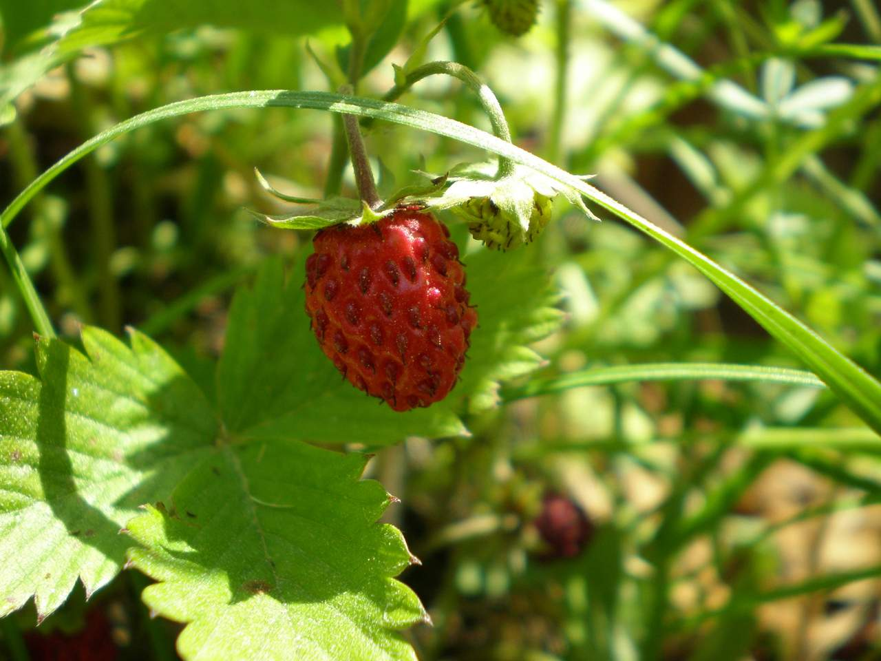 Šumska jagoda